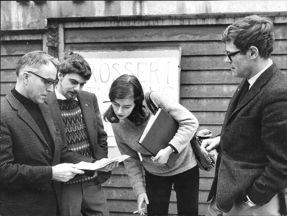 Bildtext från 1966: "Fyra debattdeltagare vid Björns trappa i Stockholm: fr. v. Tore Zetterholm, Jan Fjellander, Kristina Ahlmark-Michanek och Göran Palm." Bilden infördes i Svenska Dagbladet 1966-12-27 sid 15 (